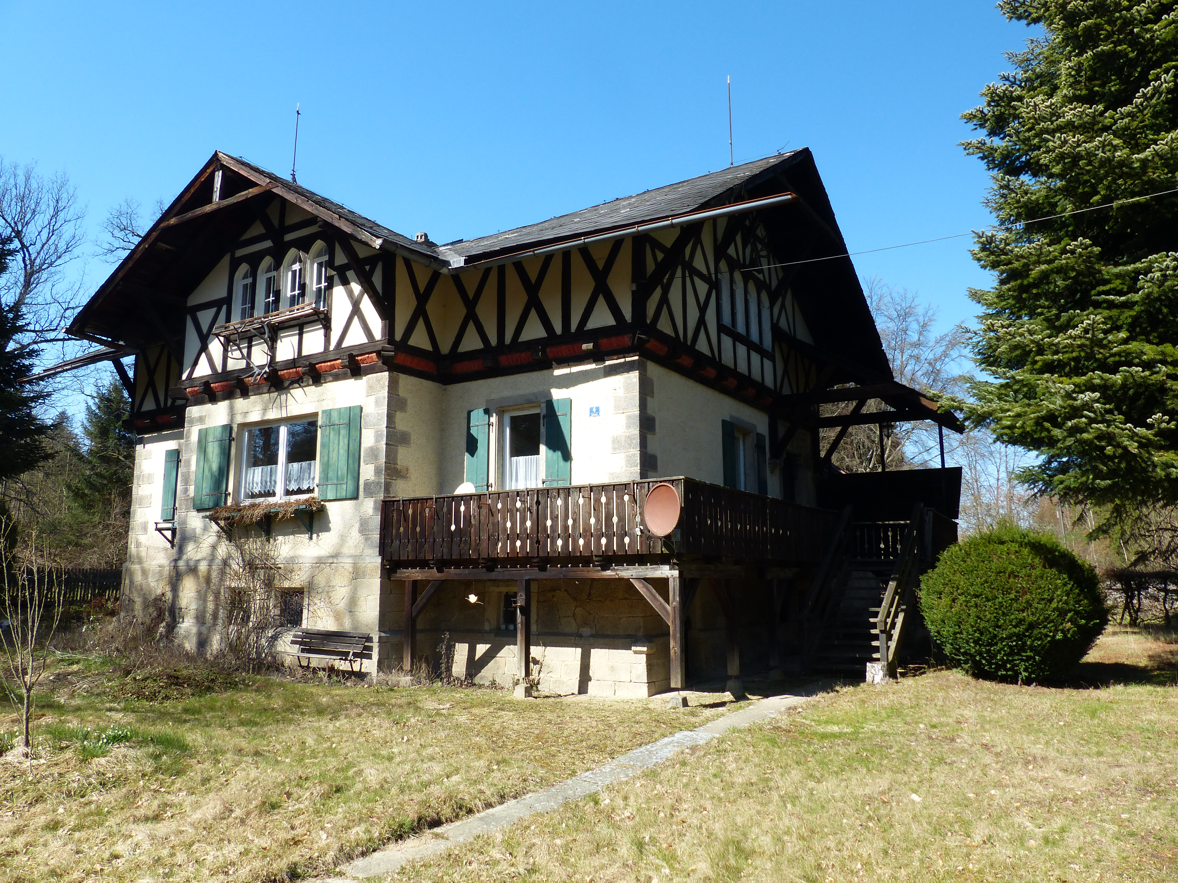 Bauwerke und Baudenkmäler in Schönwald